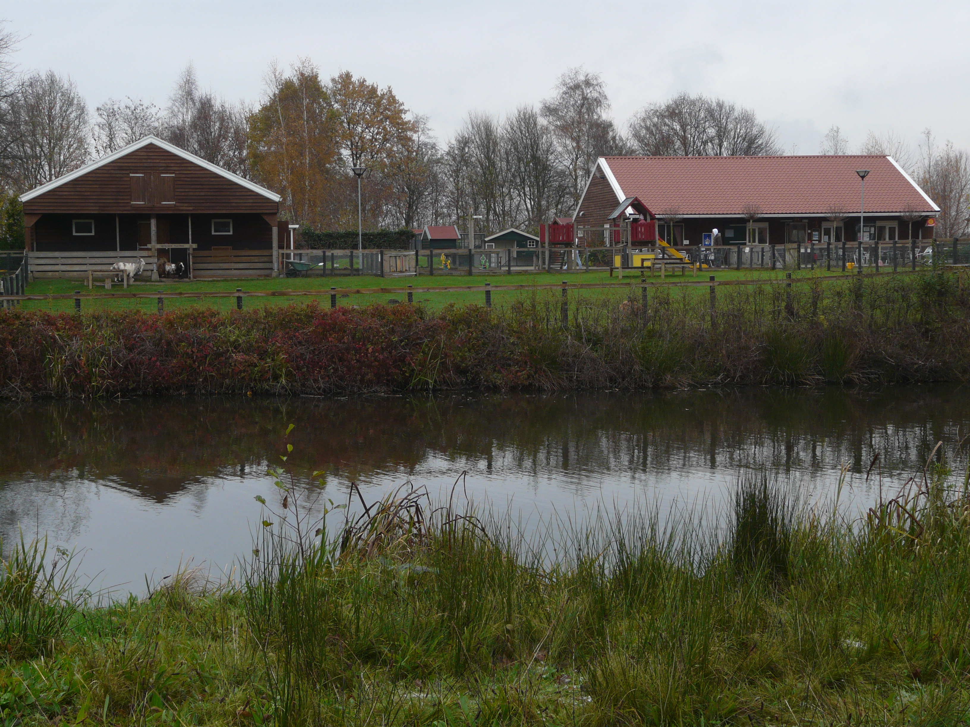 Zicht op een deel van de Kinderboerderij Breda Noord niet van de wijk de Wisselaar en Geeren Noord in de wijk Hoge Vucht in Breda Noord in Breda